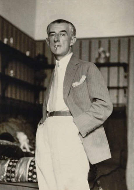 Maurice Ravel à Montfort-l'Amaury en 1928